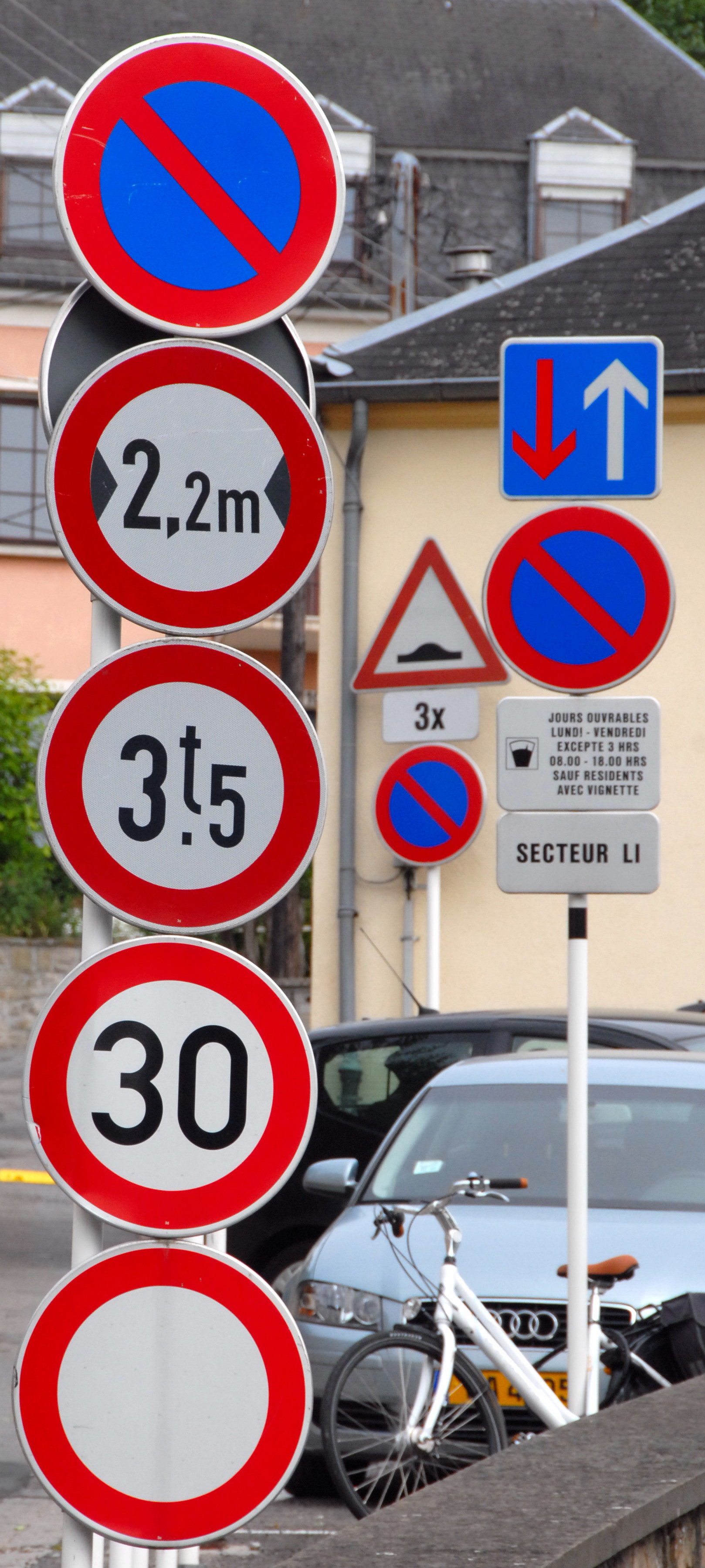 Verkéiersschëlter an der rue des Dormans an der Stad Lëtzebuerg. Kategorie:Verkéiersschëlter